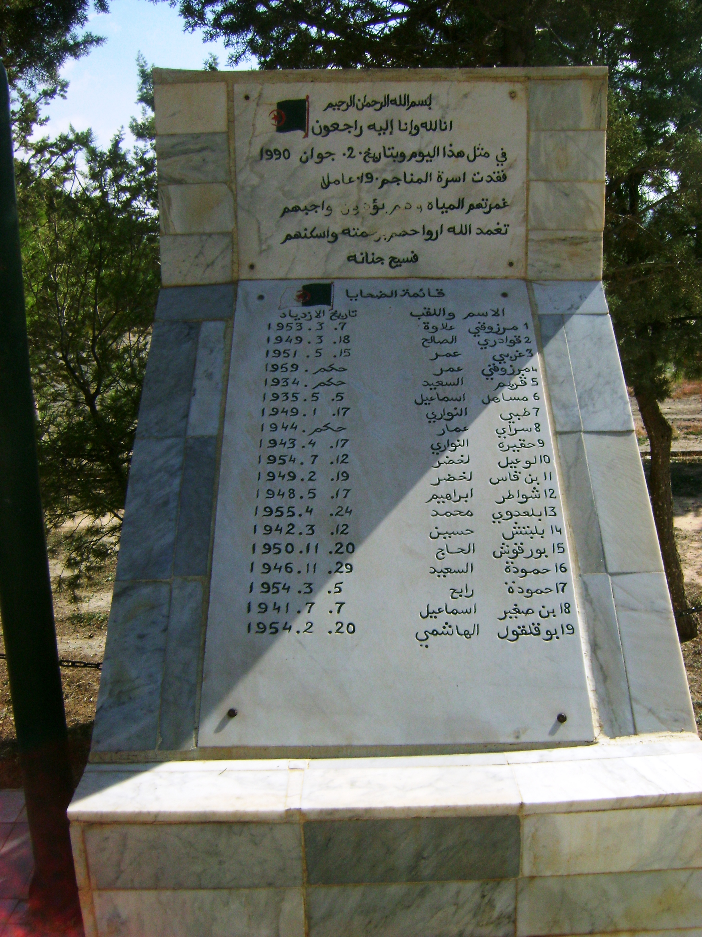 Stèle commémorative de l'accident de la mine de Kherzet Youcef ud 2 juin 1990.